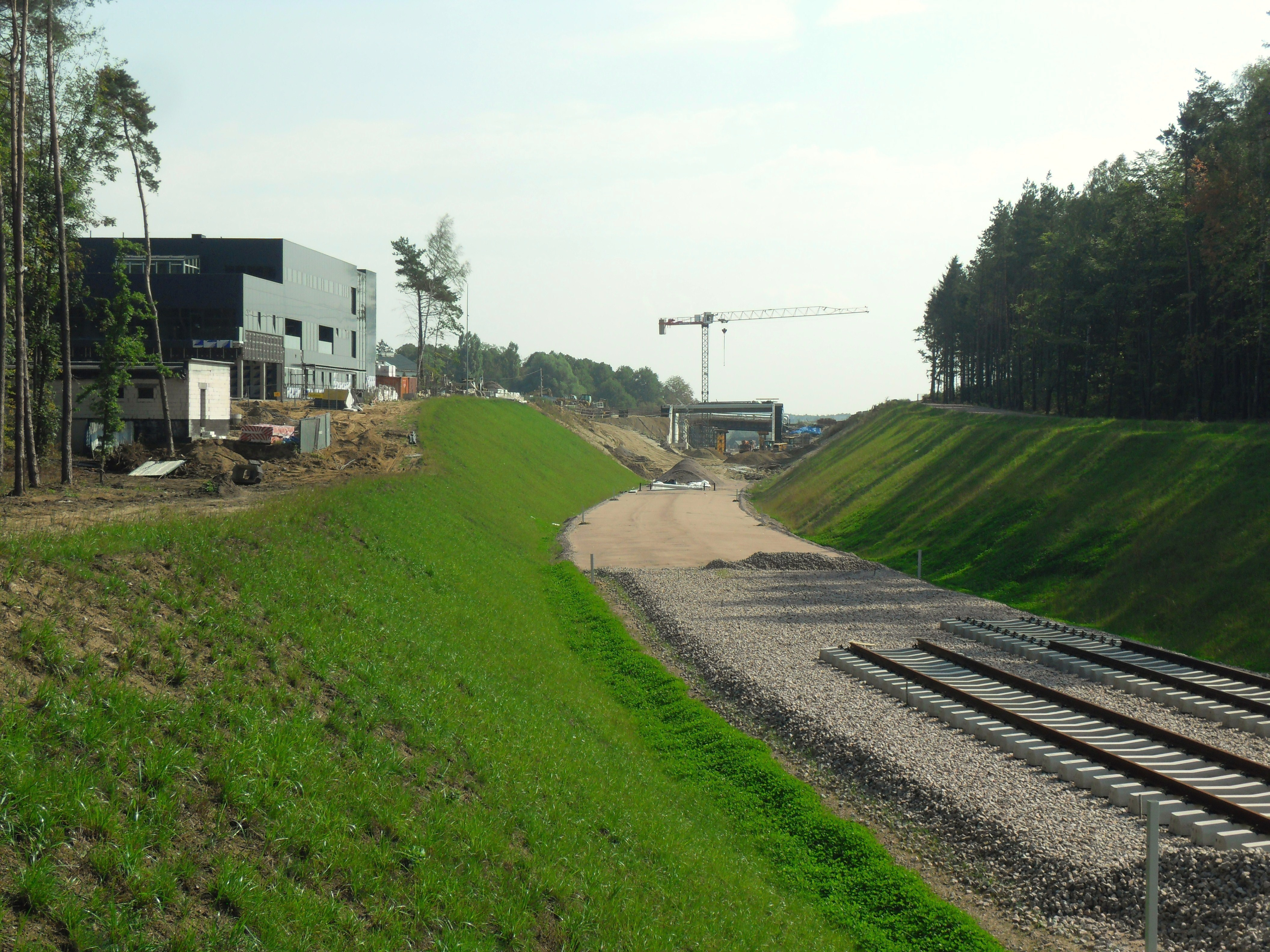 Gdańsk Matarnia. Pomorska Kolej Metropolitalna w budowie.